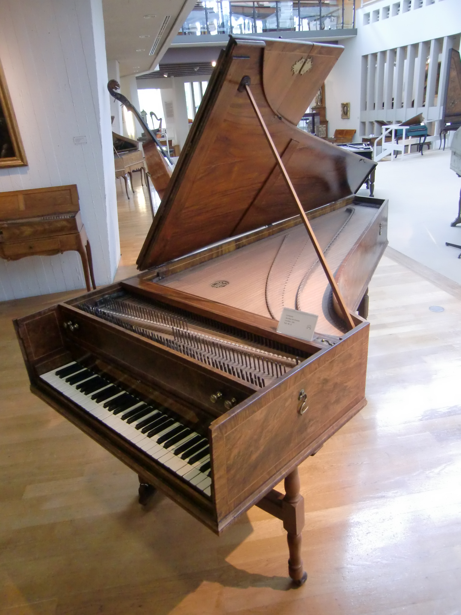 Clavecin de Jacob Kirckman (Londres 1761) - Berlin, Musikinstrumentenmuseum